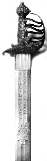 Меч с корзинчатым эфесом (хаудеген), Англия, 1650 г.